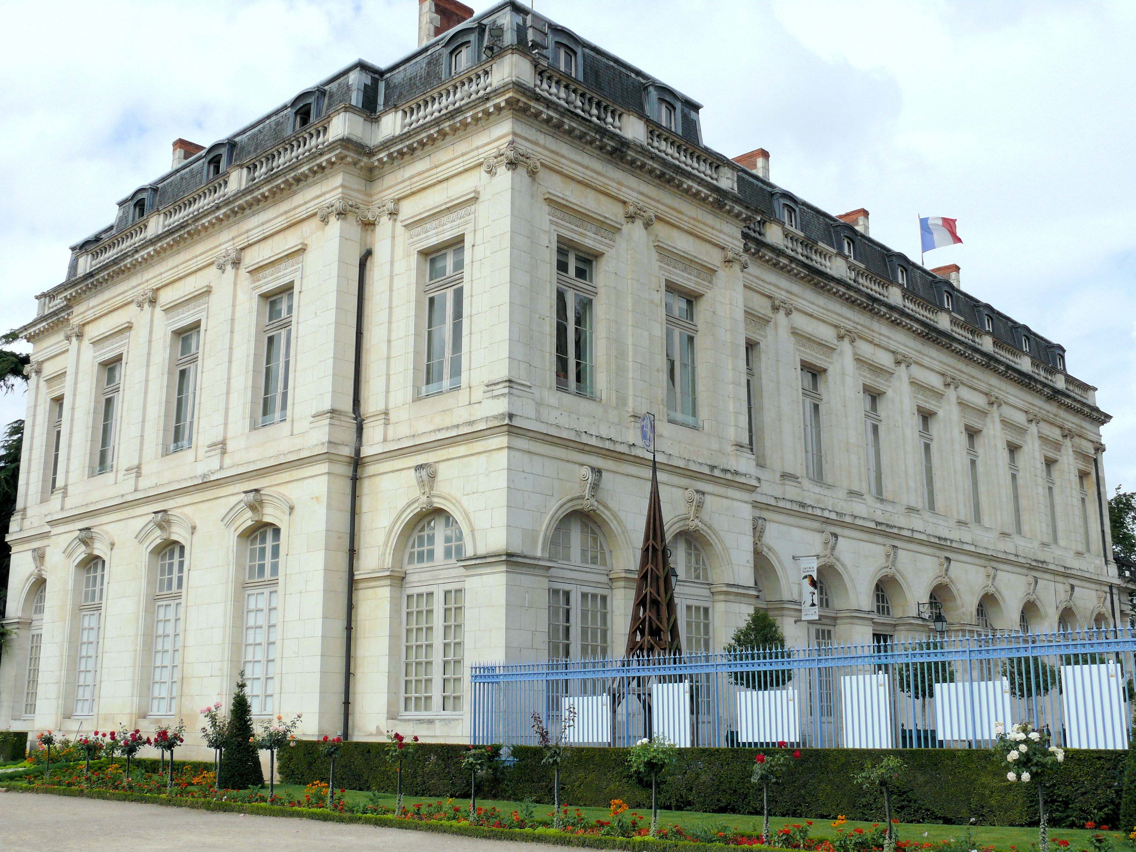 Bourges - Palais archiépiscopal - Ensemble